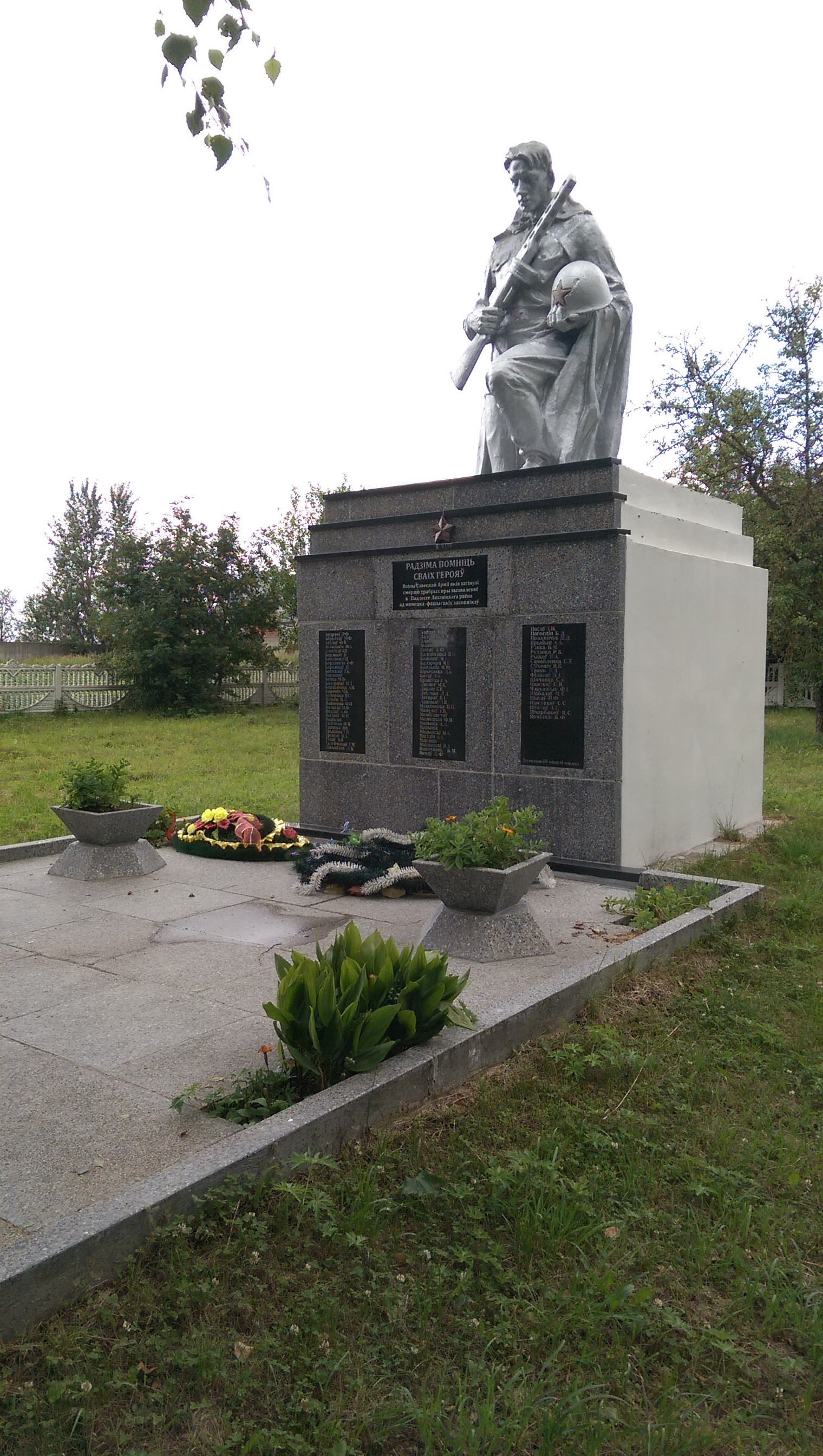 Ваенны мемарыял у Падлессі, Ляхавіцкі раён.